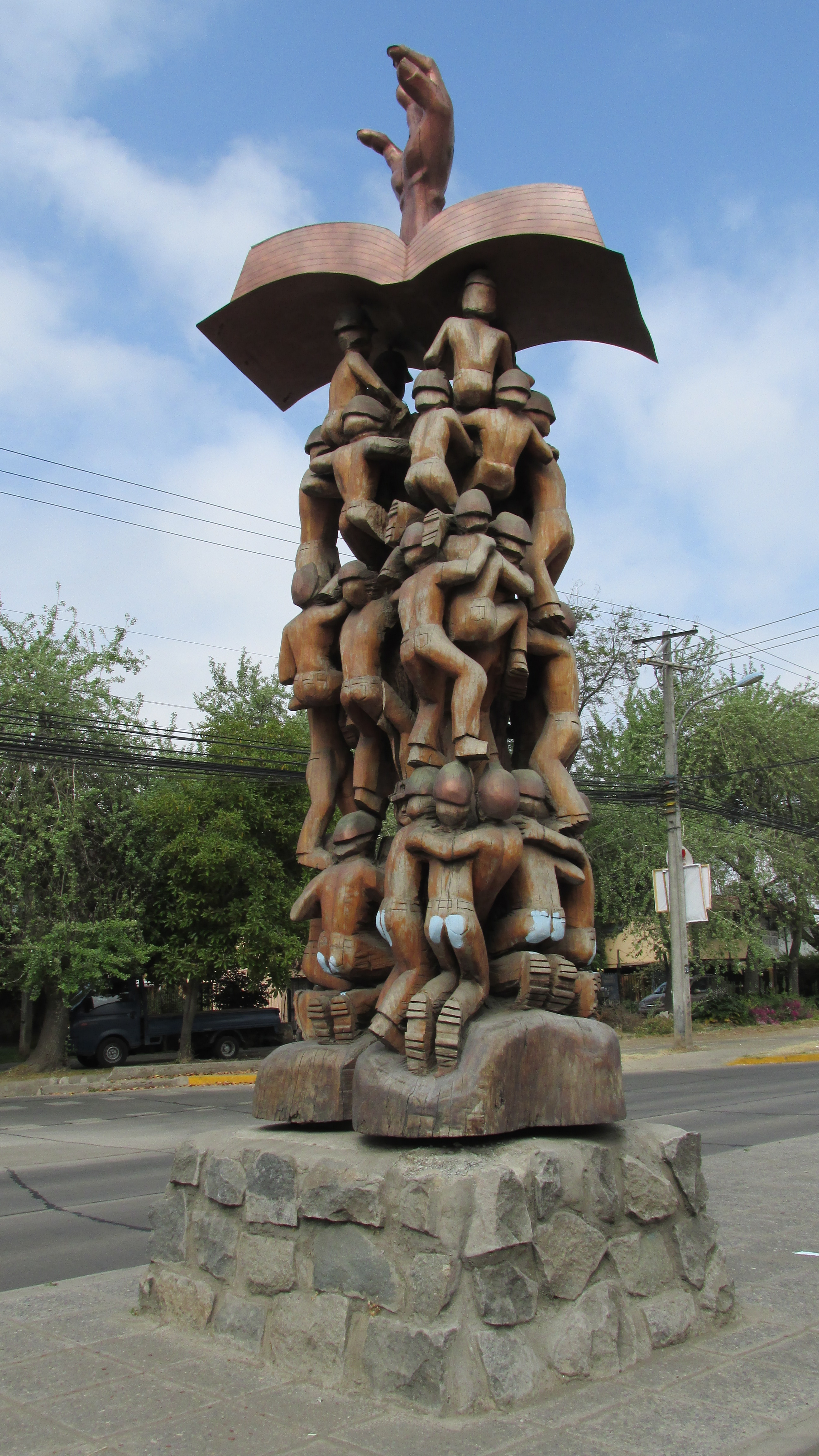 Monumento Madera a los 33 Mineros